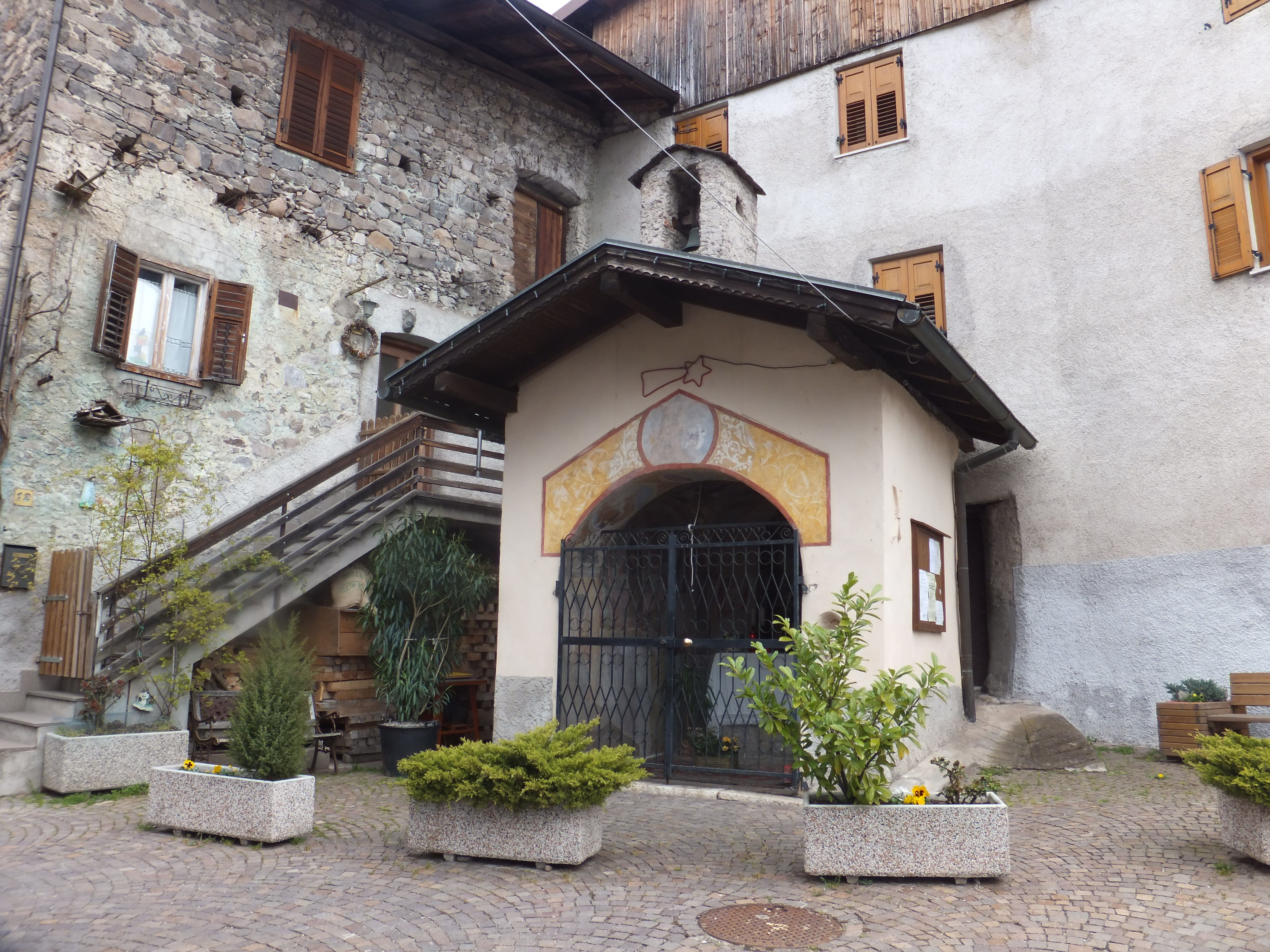 Parlo, frazione di Segonzano - cappella di santa Maria MaddalenaÆnglisc: Parlo, Segonzano - chapel of saint Mary Magdalene